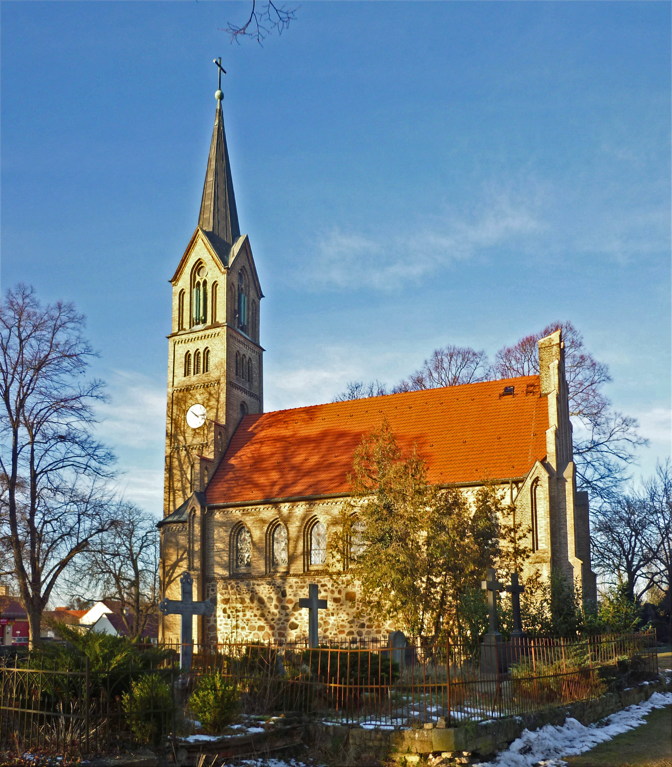 Dorfkirche in Glindow, OT von Werder (Havel), Dr.-Külz-Straße 121